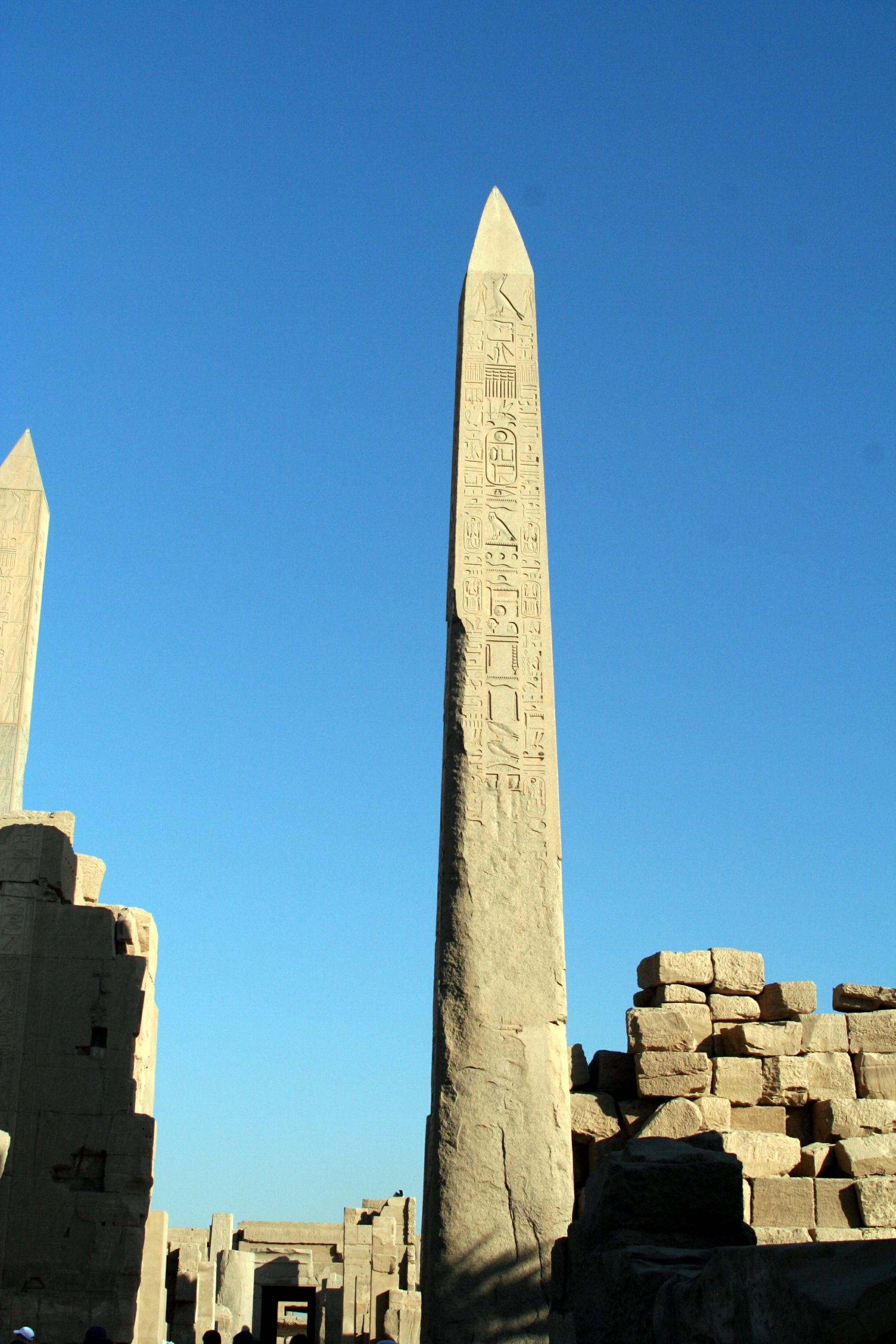 Karnak Temple at Luxor